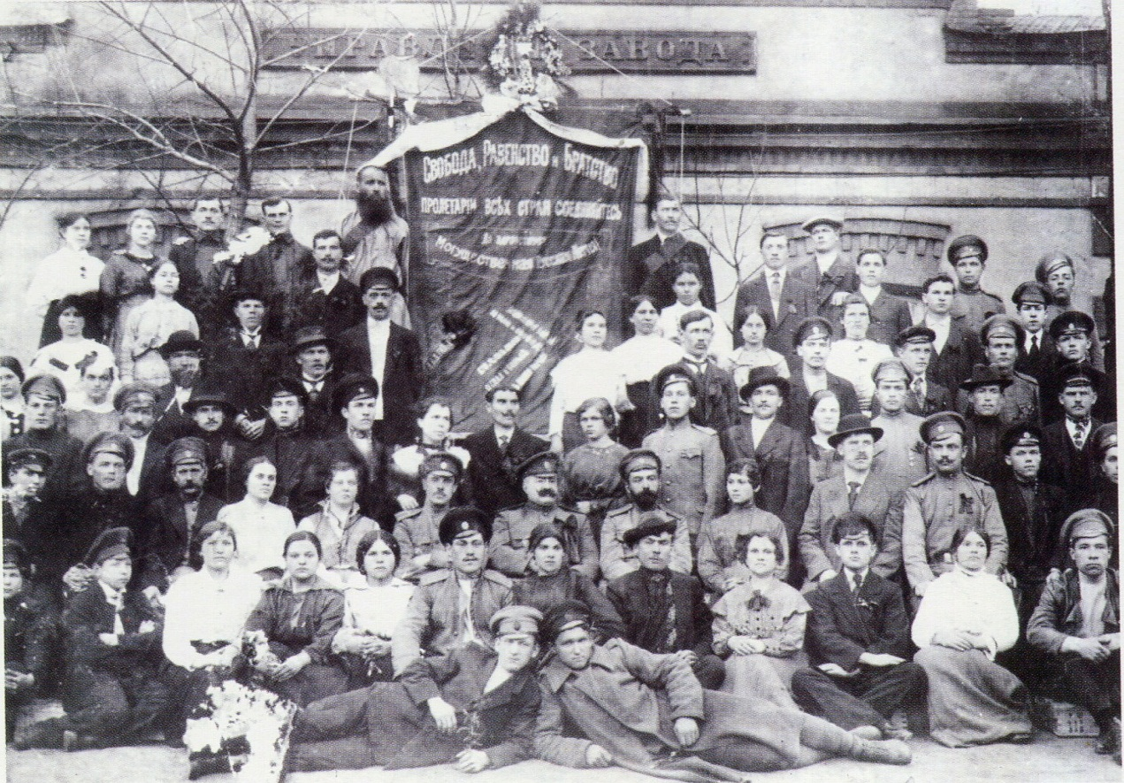 Луганск. 1 мая 1917 г. Рабочие патронного завода.jpg